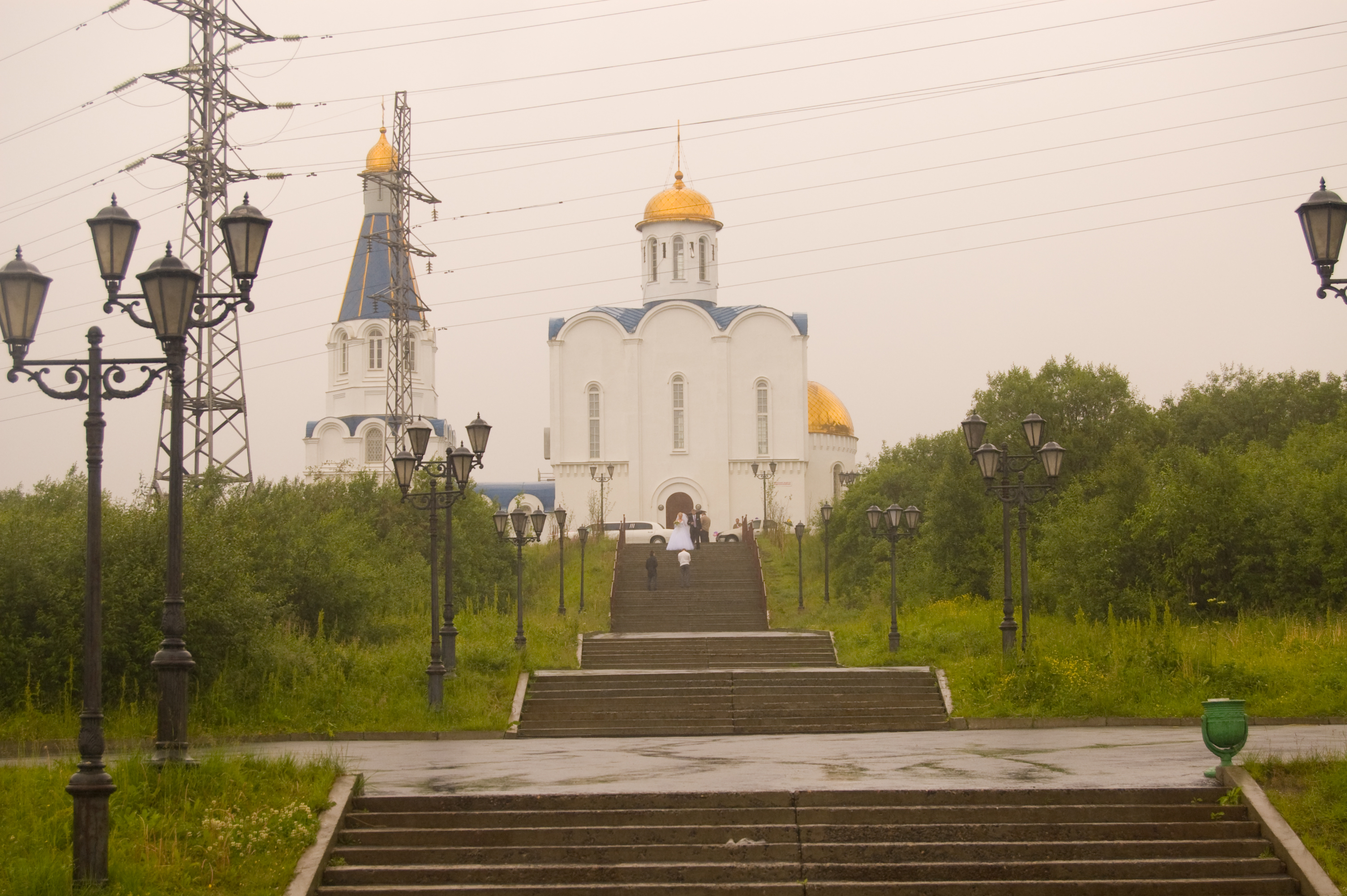 Мурманск. Церковь Спаса Нерукотворного Образа ("Спас на водах")